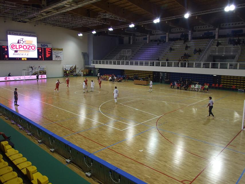 Partido entre el ElPozo Murcia y el Iberia 2003 Tbilisi de la Uefa Cup 2009 disputado en Conegliano, Italia.